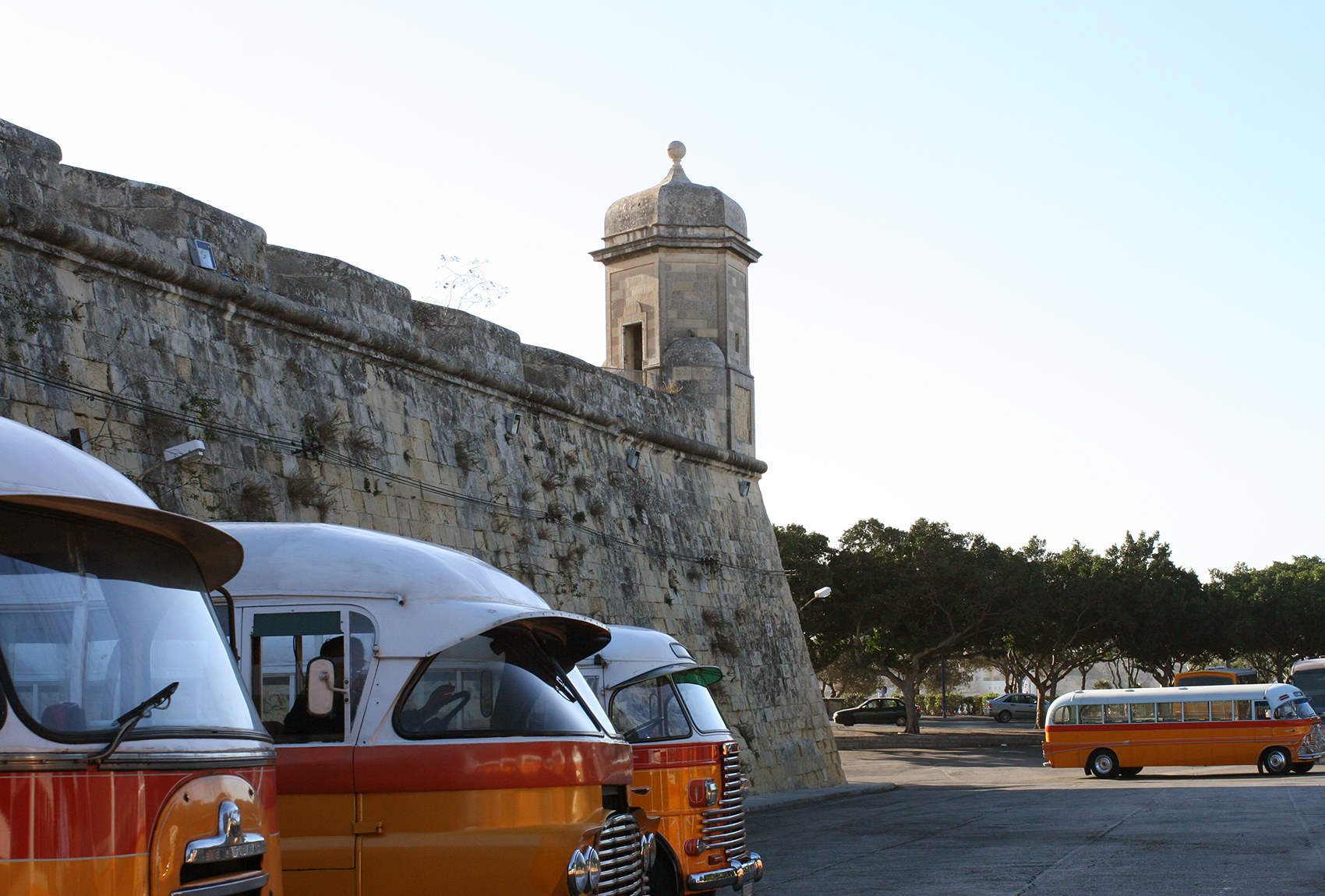 Malta, Valletta, vedette at city gate bus station